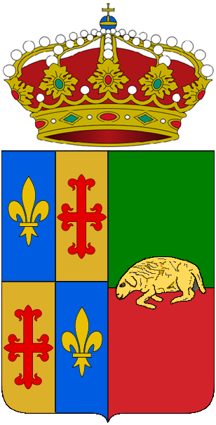 Escudo de Quintanaloma, en el municipio de Valle de Sedano (Burgos, España)